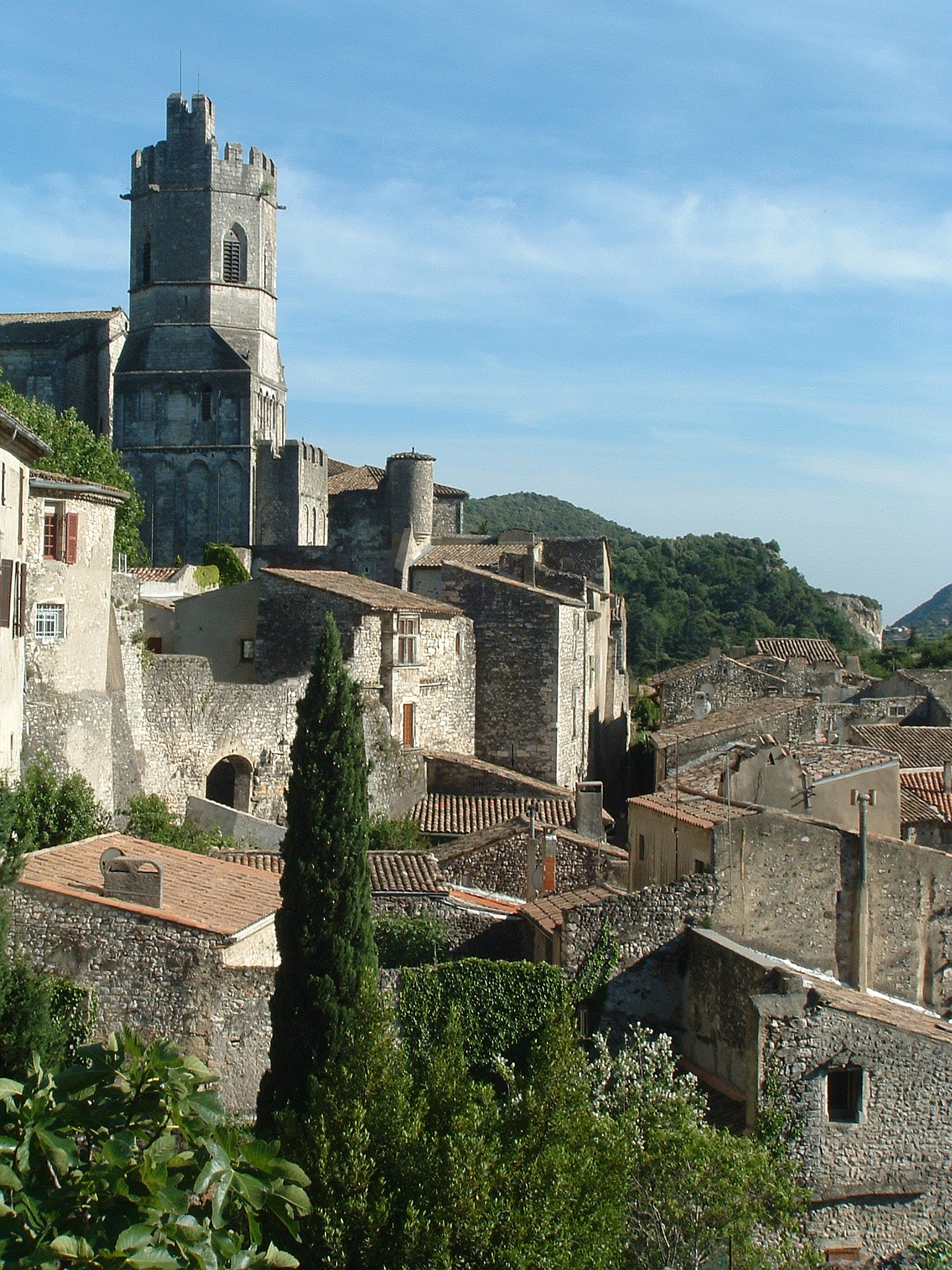 Viviers - Le village dominé par la cathédrale